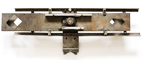 manuális kezelésű képátúsztató berendezés 1968-ból